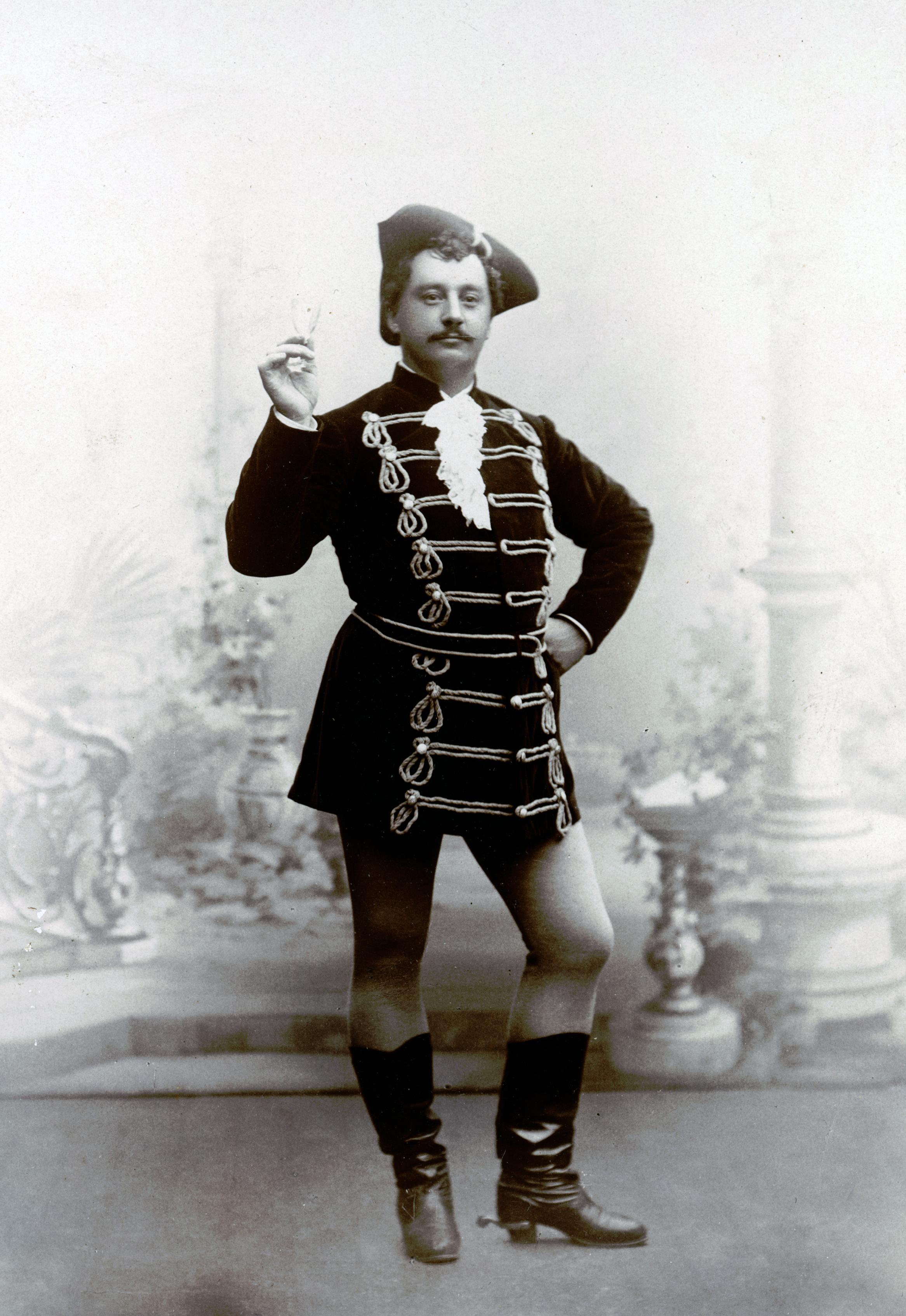 Emil Adami som Wilhelm Meister i Mignon, gästspel av August Lindbergs sällskap på Stora teatern i Göteborg 1892